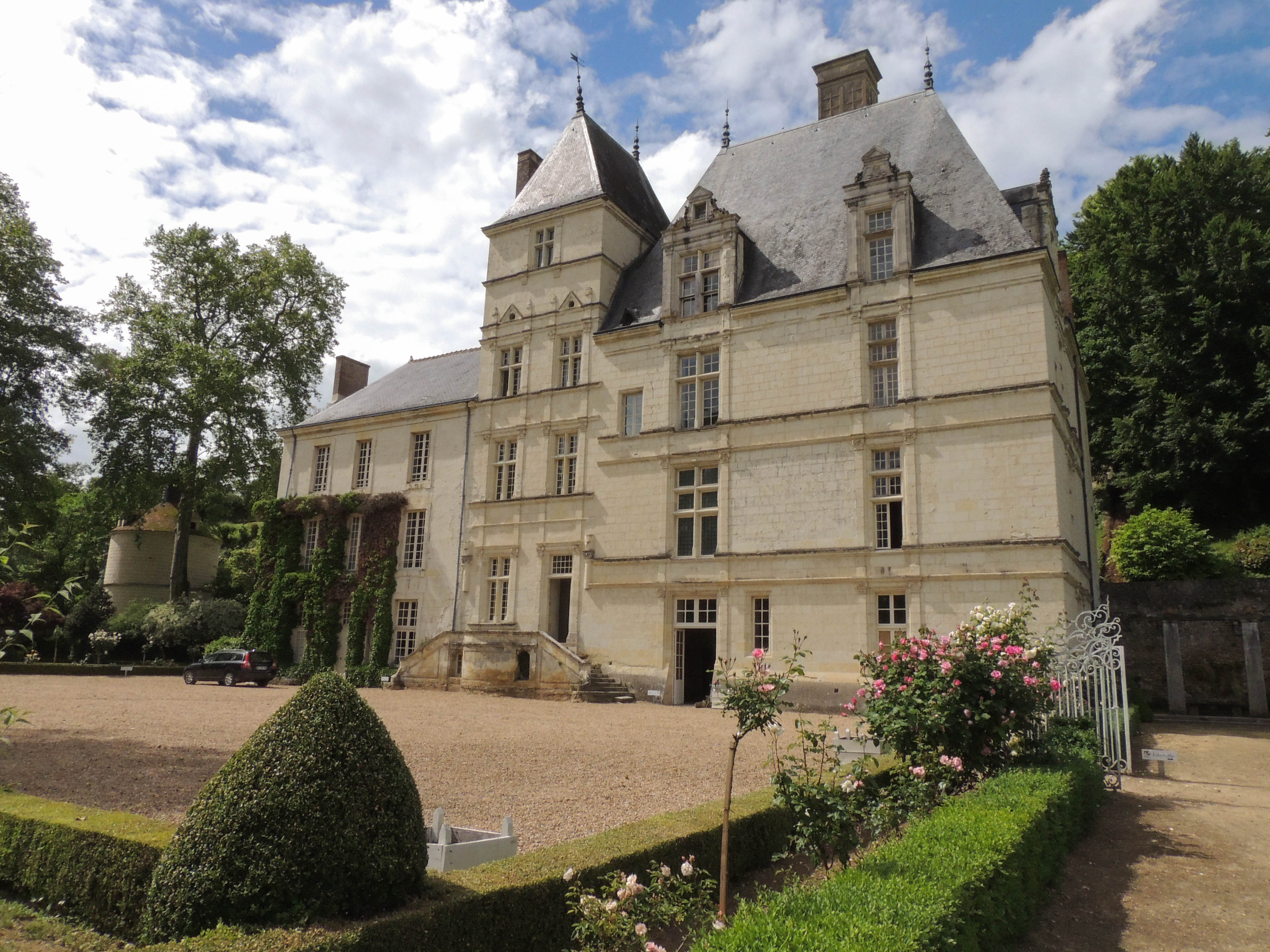 Vue sur la façade sud du Château de Poncé-sur-le-Loir.